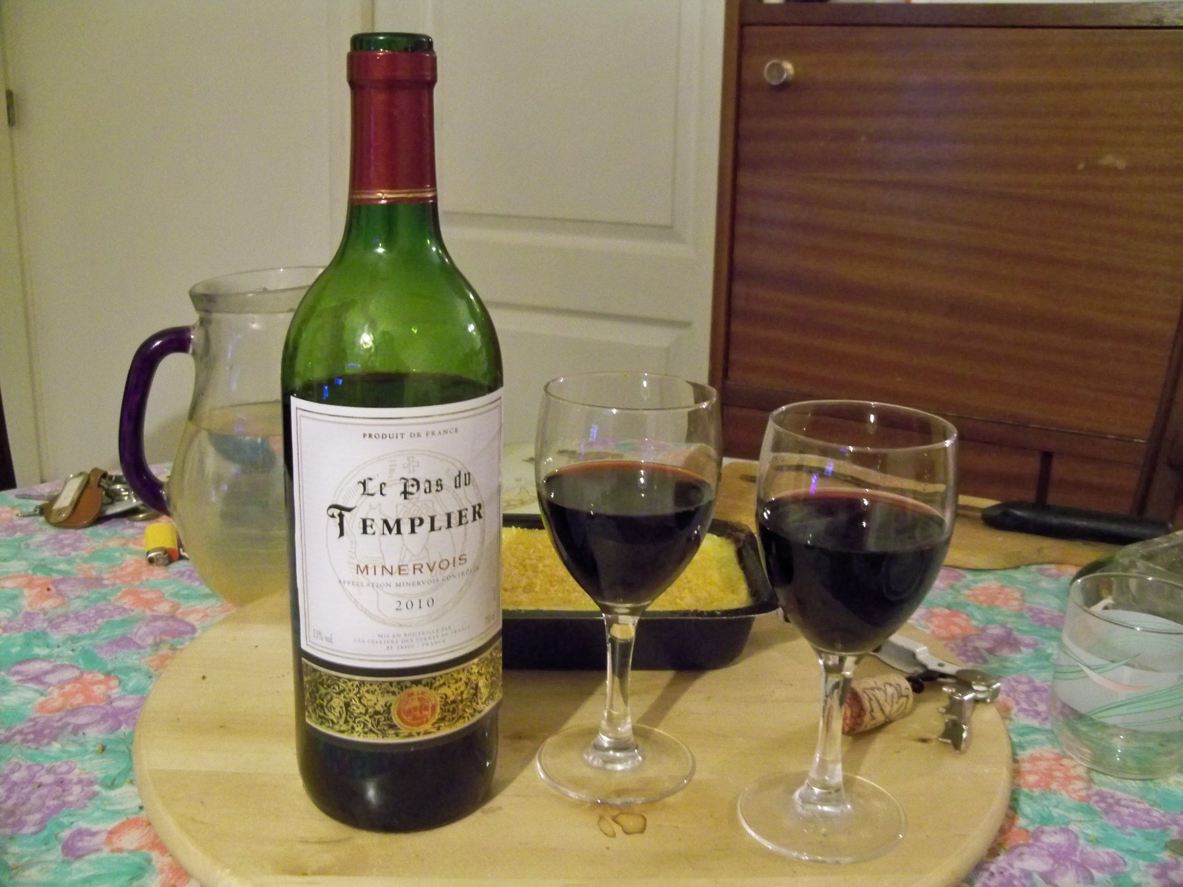 bouteille de Minervois AOC